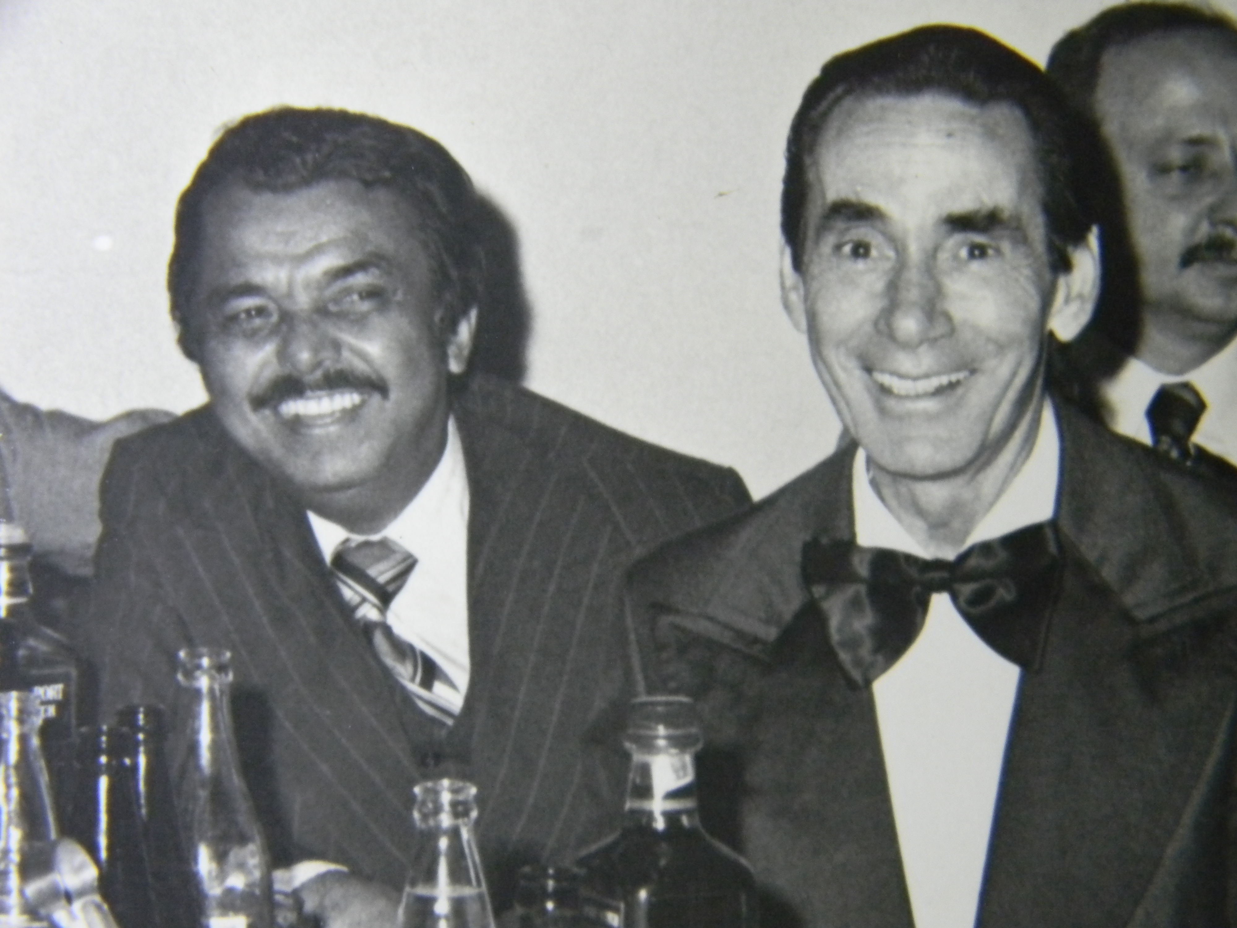 Henrique de Almeida ao lado de Nelson Gonçalves